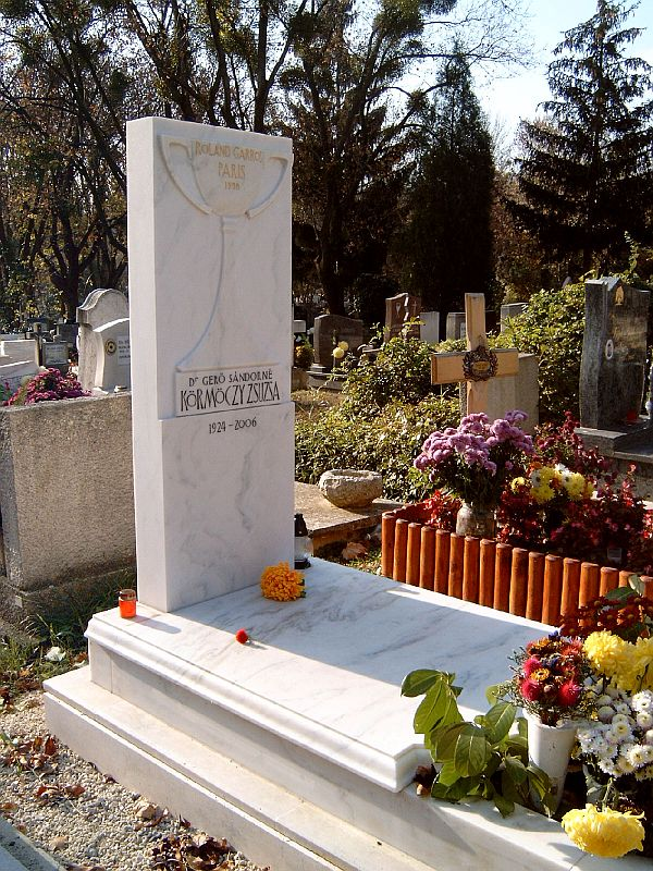 Körmöczy Zsuzsa (Budapest, 1924. augusztus 25. – Budapest, 2006. szeptember 16.) teniszező sírja Budapesten. Farkasréti temető: 7/7-1-199.